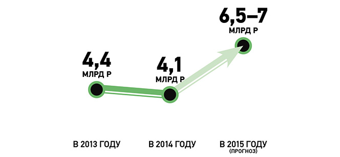 Экспорт сельскохозяйственной техники из России, 2013-2014, прогноз 2015